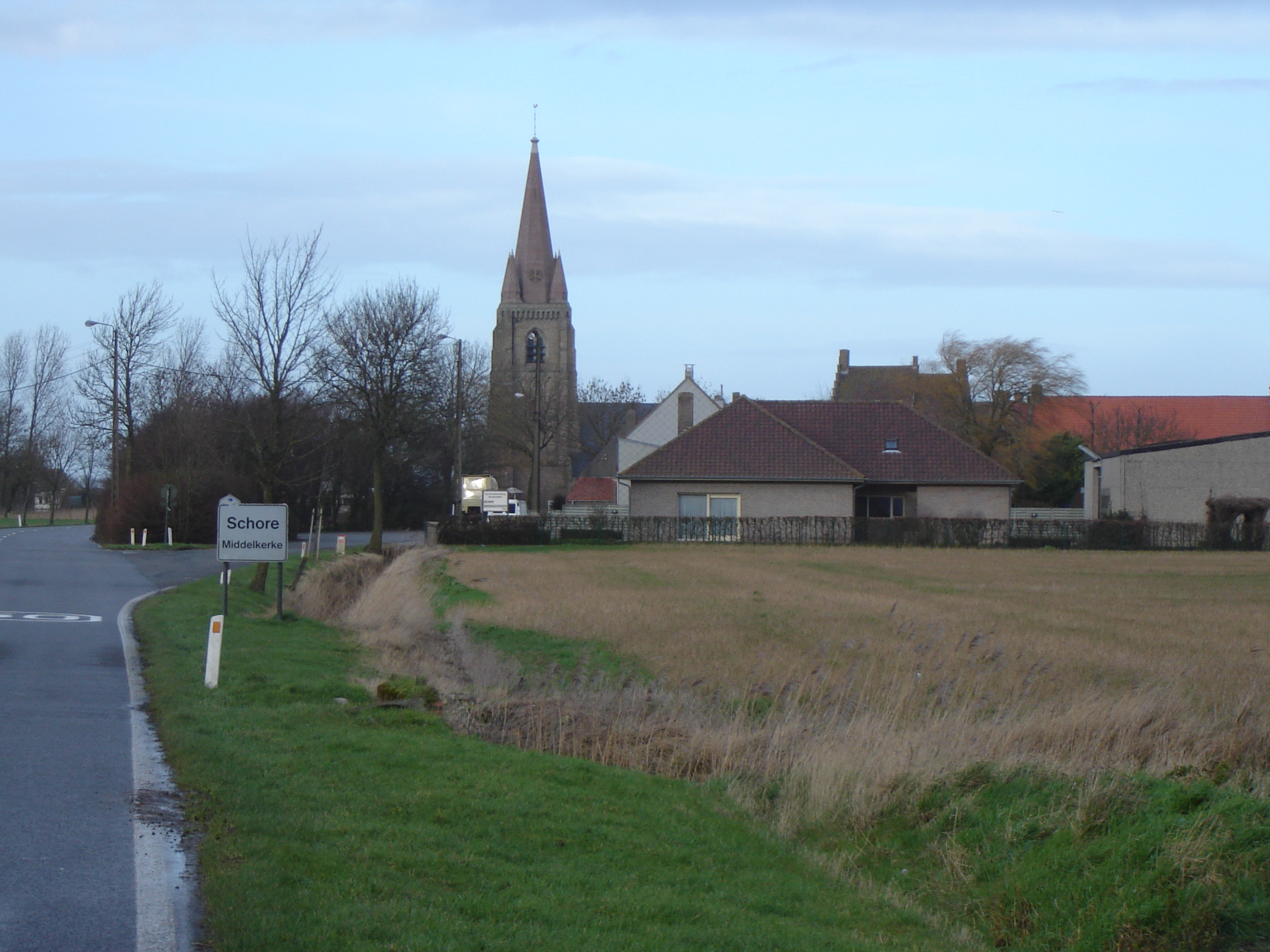 Village of Schore in Middelkerke, West Flanders, Belgium